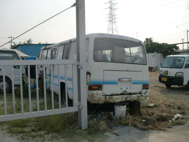 1969年~1982年製造の初代コースター。